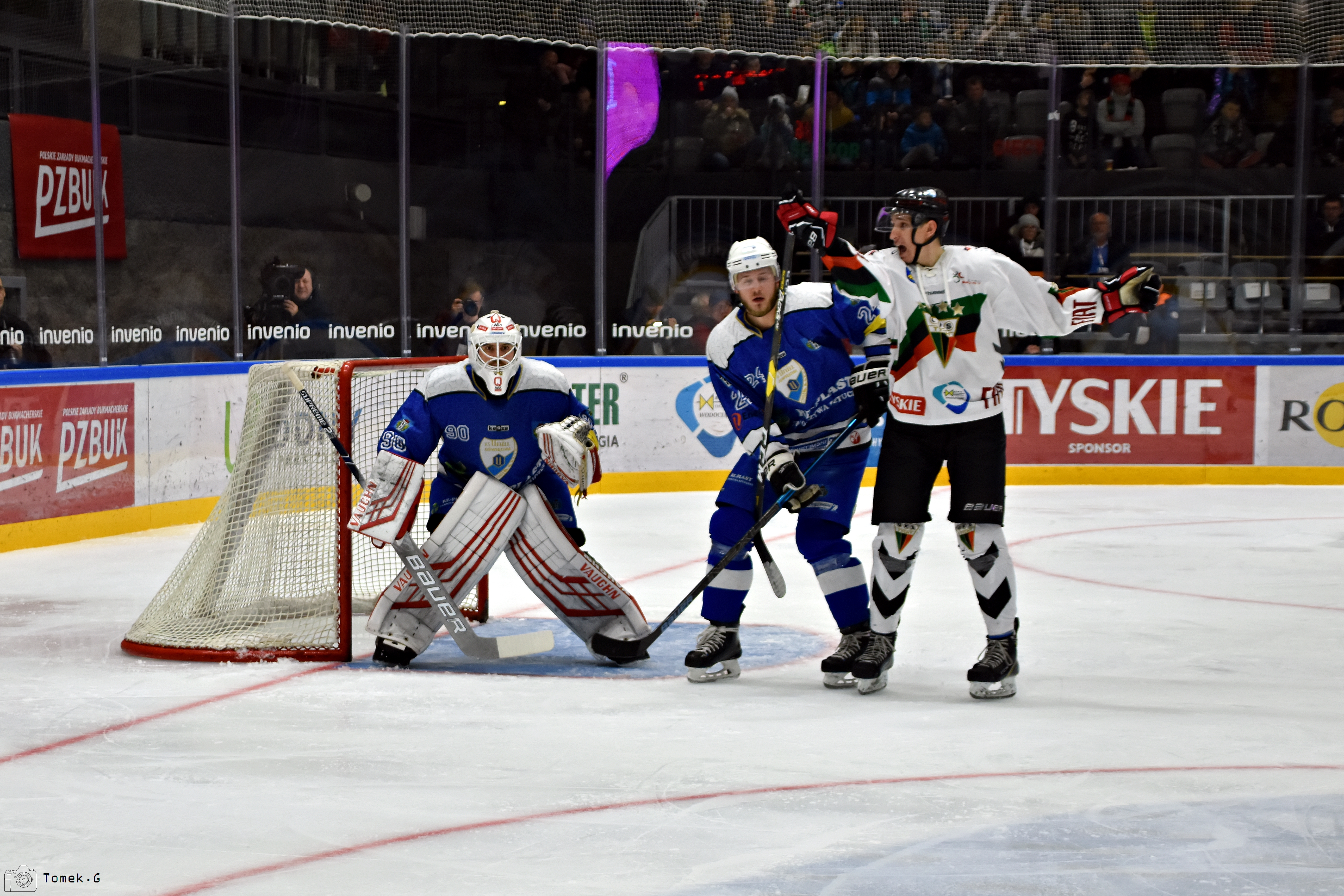 Puchar Polski w Hokeju na Lodzie 2019/2020